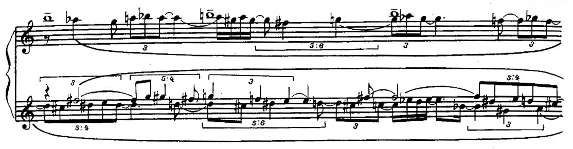 Э.В.Денисов. Знаки на белом (пьеса для фп.; фрагмент). Образец применения особых видов ритмического деления